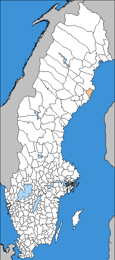 Robertsfors kommun in Sweden